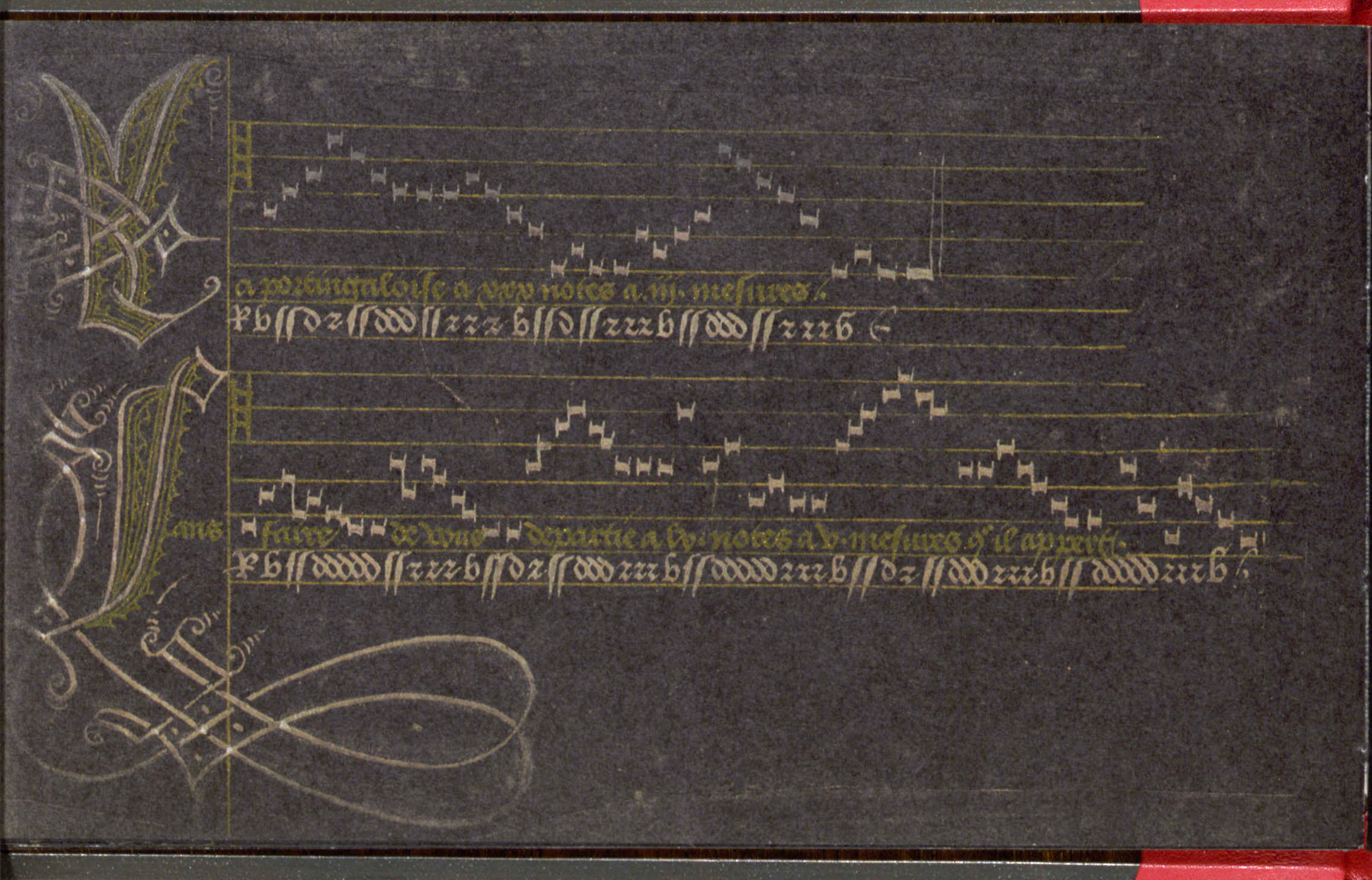 Das Tanzbüchlein der Margarete von Österreich